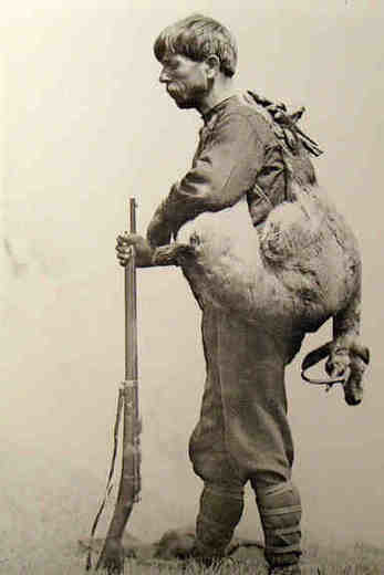 Christos Kakkalos